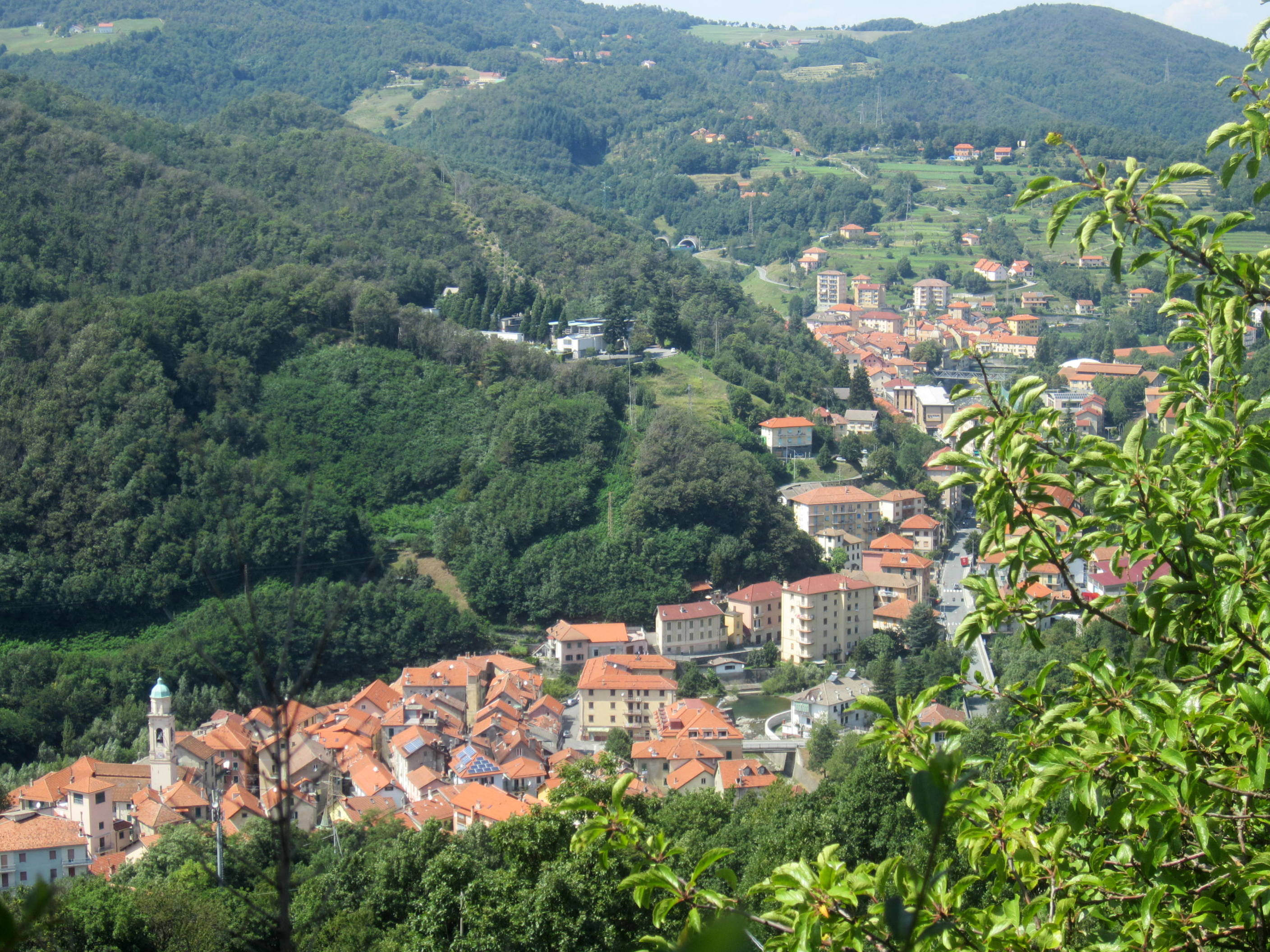 Panorama di Rossiglione Superiore e Inferiore